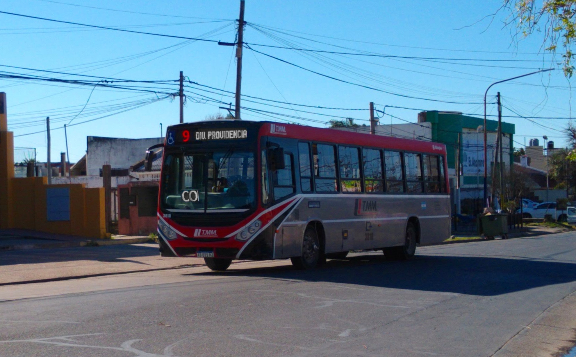 Transporte Mariano Moreno S.R.L. (Grupo ERSA) Buses Paraná U.T.E. Línea 9 - #3810 Metalpar Tronador III Volkswagen 17.230-OD Av. de las Américas y Moisés Lebensohn (Paraná, Entre Ríos)